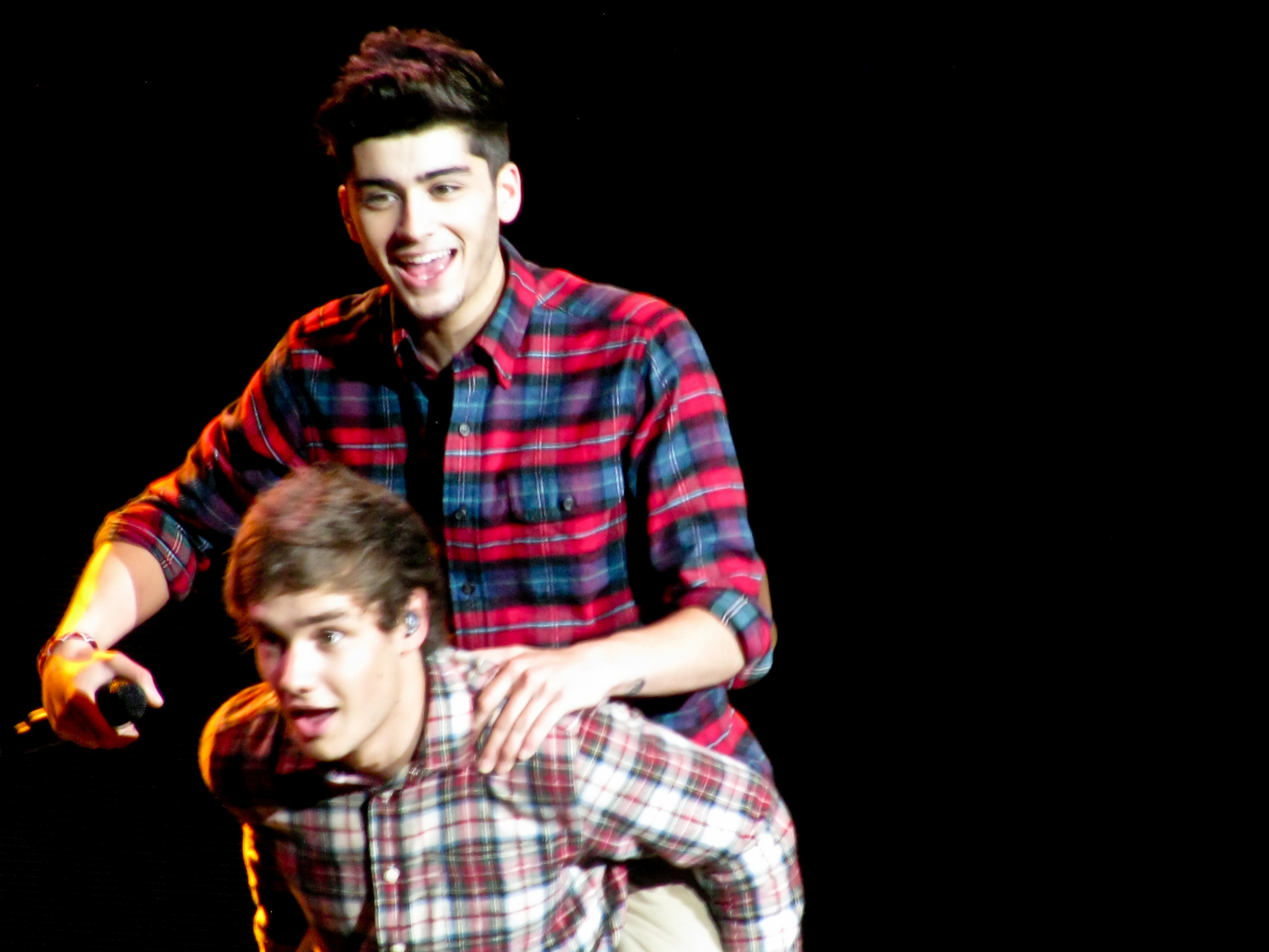 Zayn Malik & Liam Payne de One Direction